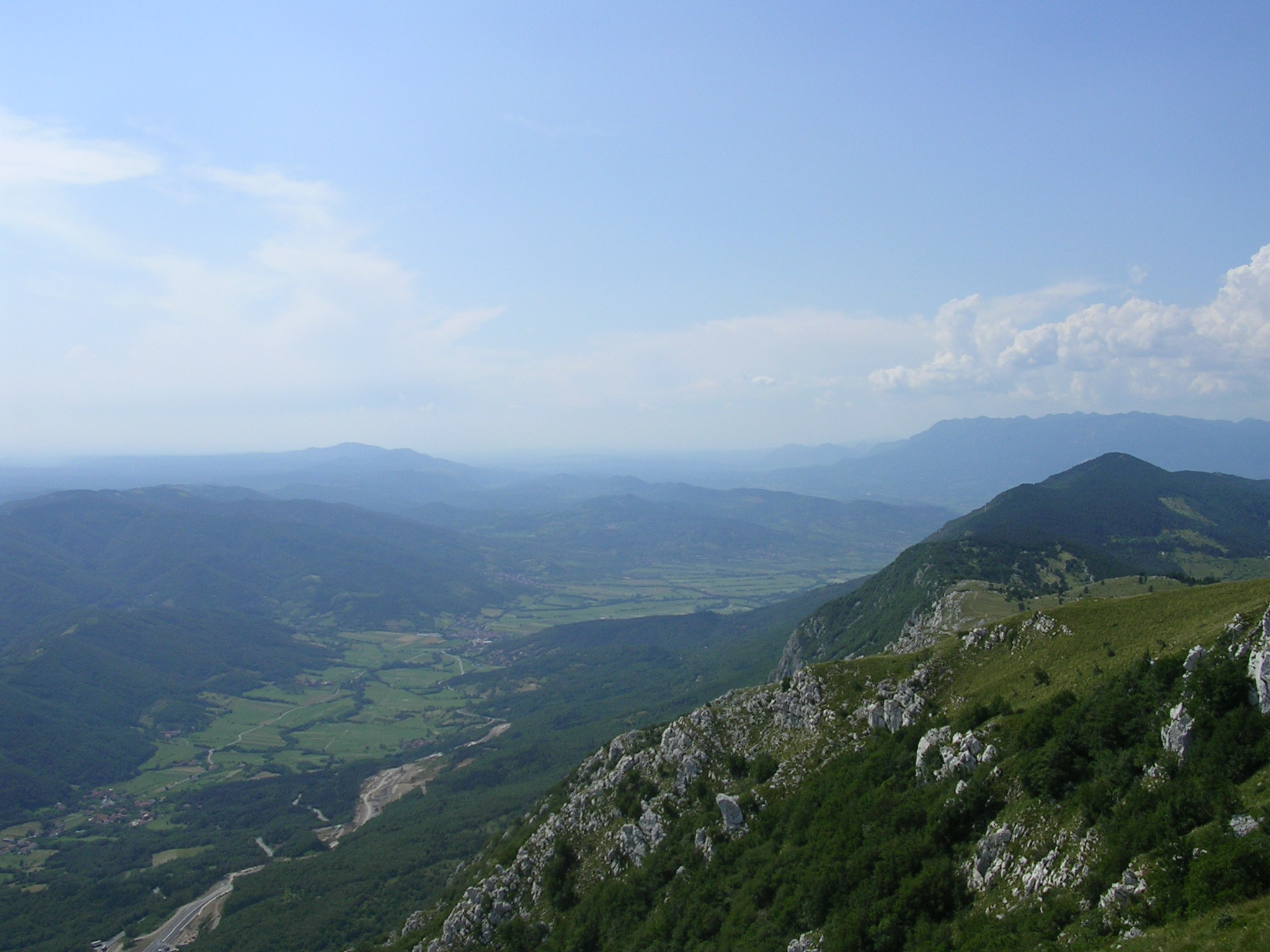 Vipava valley from Nanos